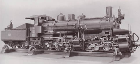 Die zwei von Floridsdorf gebauten Zahnradlokomotiven der Baureihe IIIc5 mit den Nummern 751–752 und der Achsfolge 2zz'C n2(4v) waren unechte Mallet-Loks, bei denen sich der vom Niederdrucktriebwerk angetriebene Zahnradantrieb und die beiden Laufachsen im vorderen Deichselgestell befanden. Im Adhäsionsbetrieb arbeiteten die beiden Hochdrucktriebwerke als Zwillingsmaschine direkt auf die Treibachse. Auf Zahnstangenabschnitten wurden die beiden Niederdruckzylinder des Zahnradantriebs hinzugeschaltet und die Lokomotive arbeitete im Verbundbetrieb.